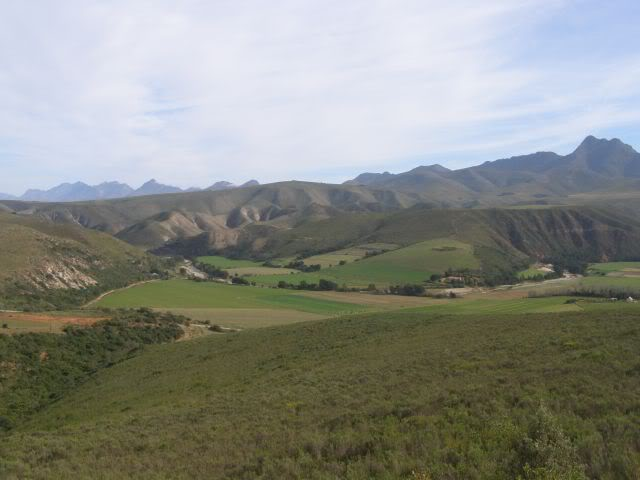 Uitsig vanaf 'n afstand.